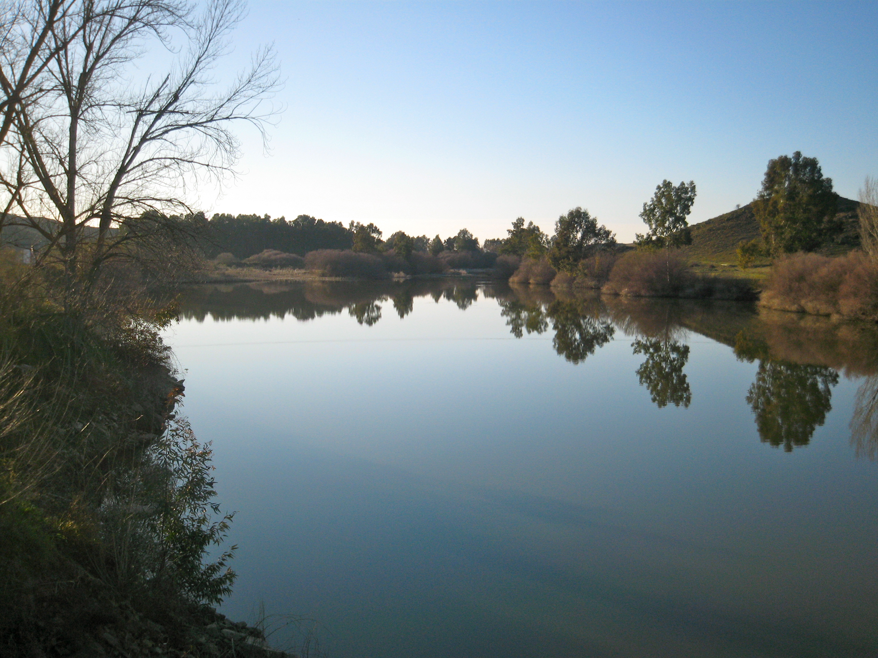 35 - E2-07-Zujar - aguas abajo